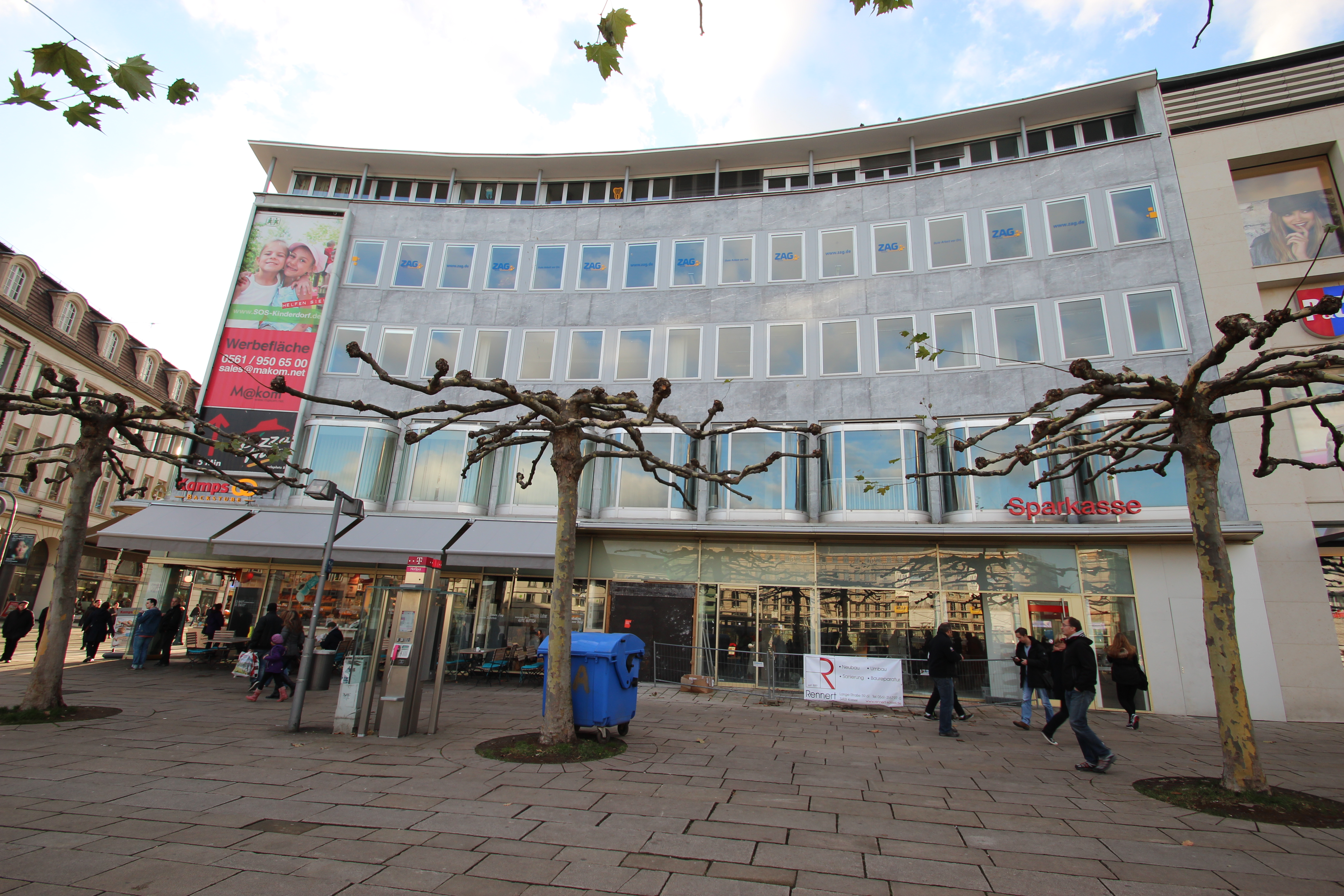 Kino „Kaskade“ Königsplatz 53 in Kassel